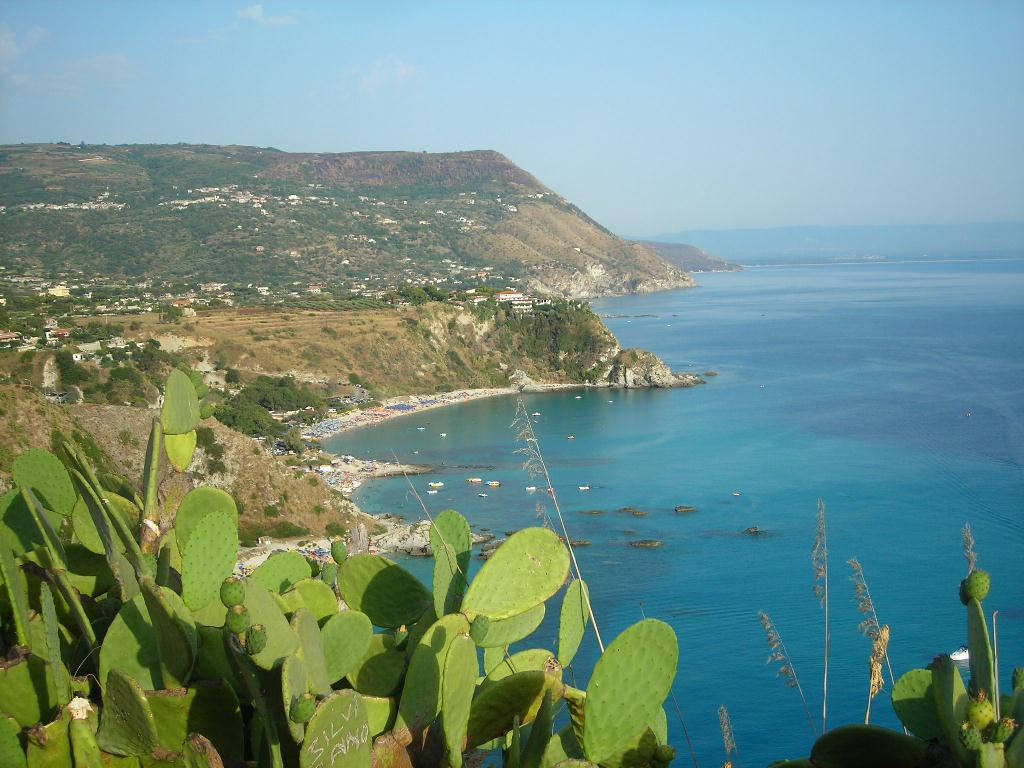 Vista da Capo Vaticano